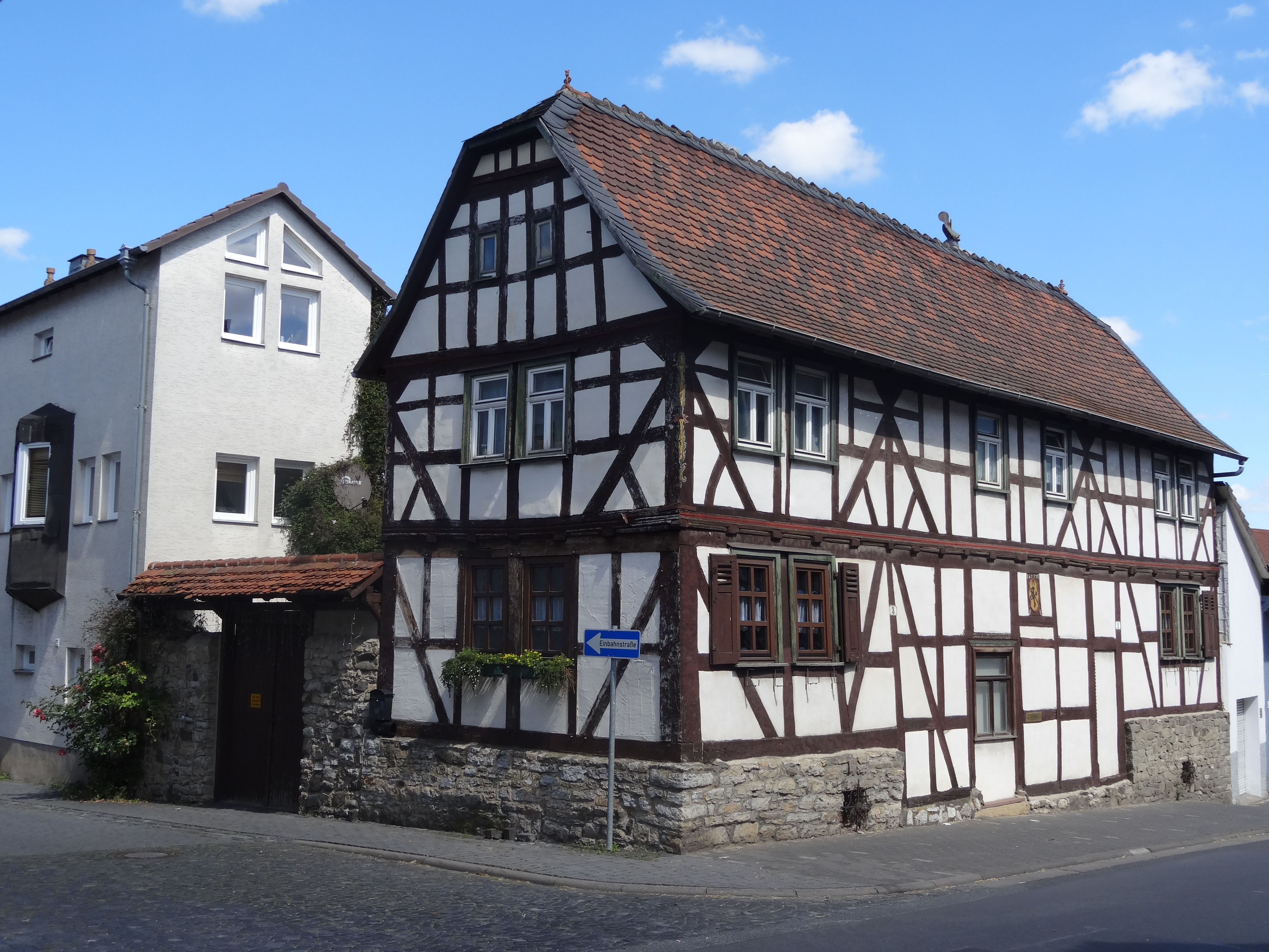 Haus Paradiesgärtlein, Obergasse 1-3, 35428 Lang-Göns